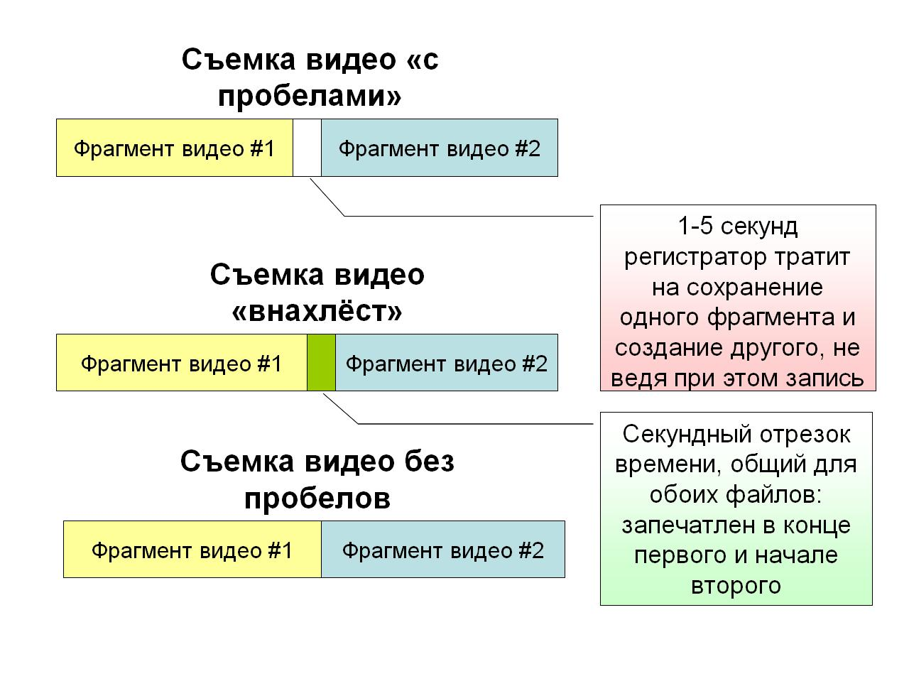 Сохранение файлов в разных регистраторах